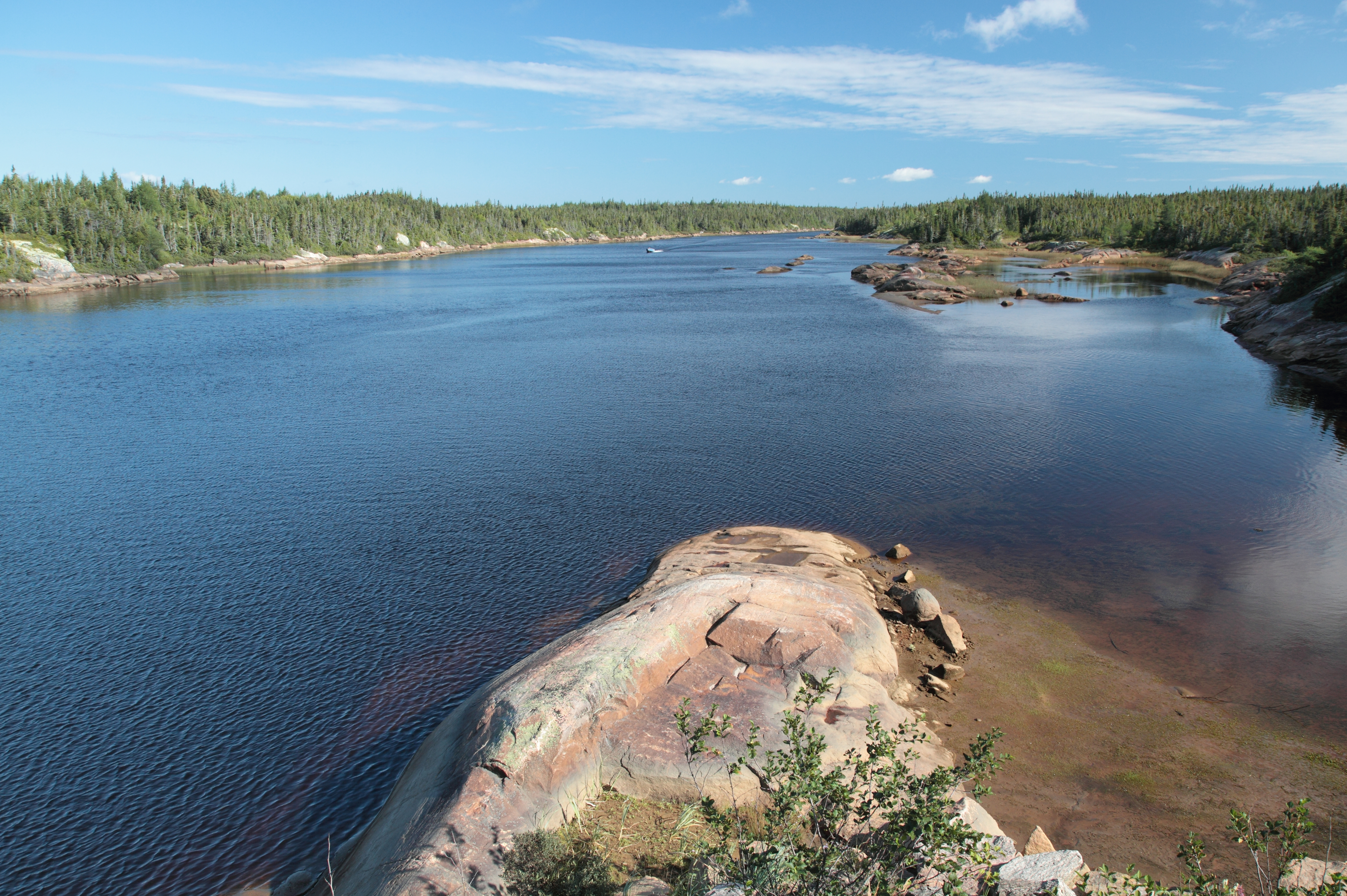 Rivière Nabisipi, Aguanish, Québec, Canada